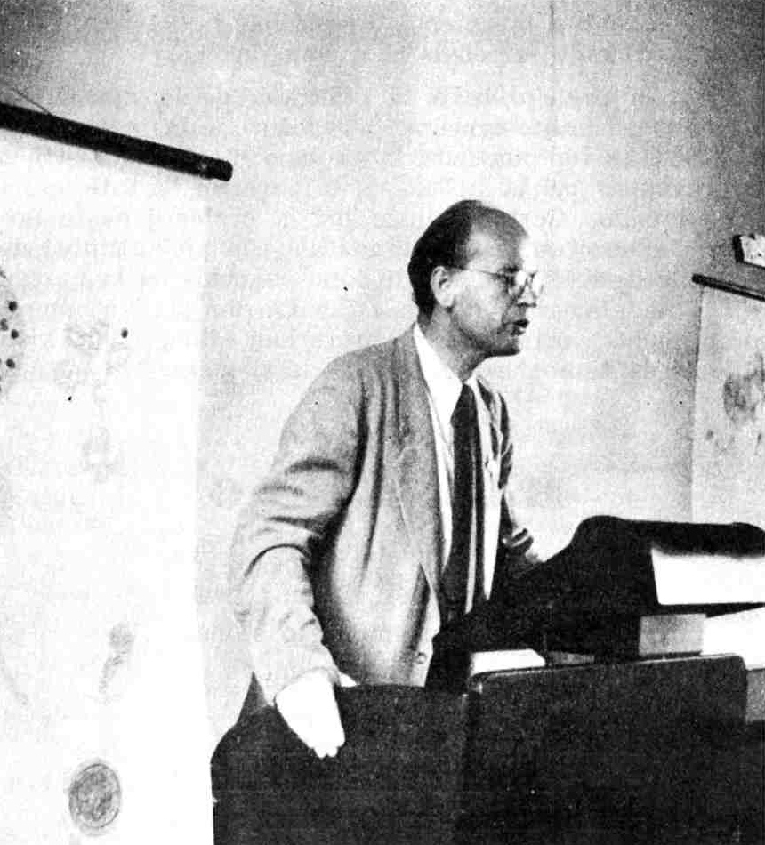 UK 1948. S-ro Neergaard parolas.